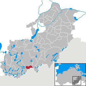 Godendorf in Mecklenburg-Vorpommern, Landkreis Mecklenburg-Strelitz